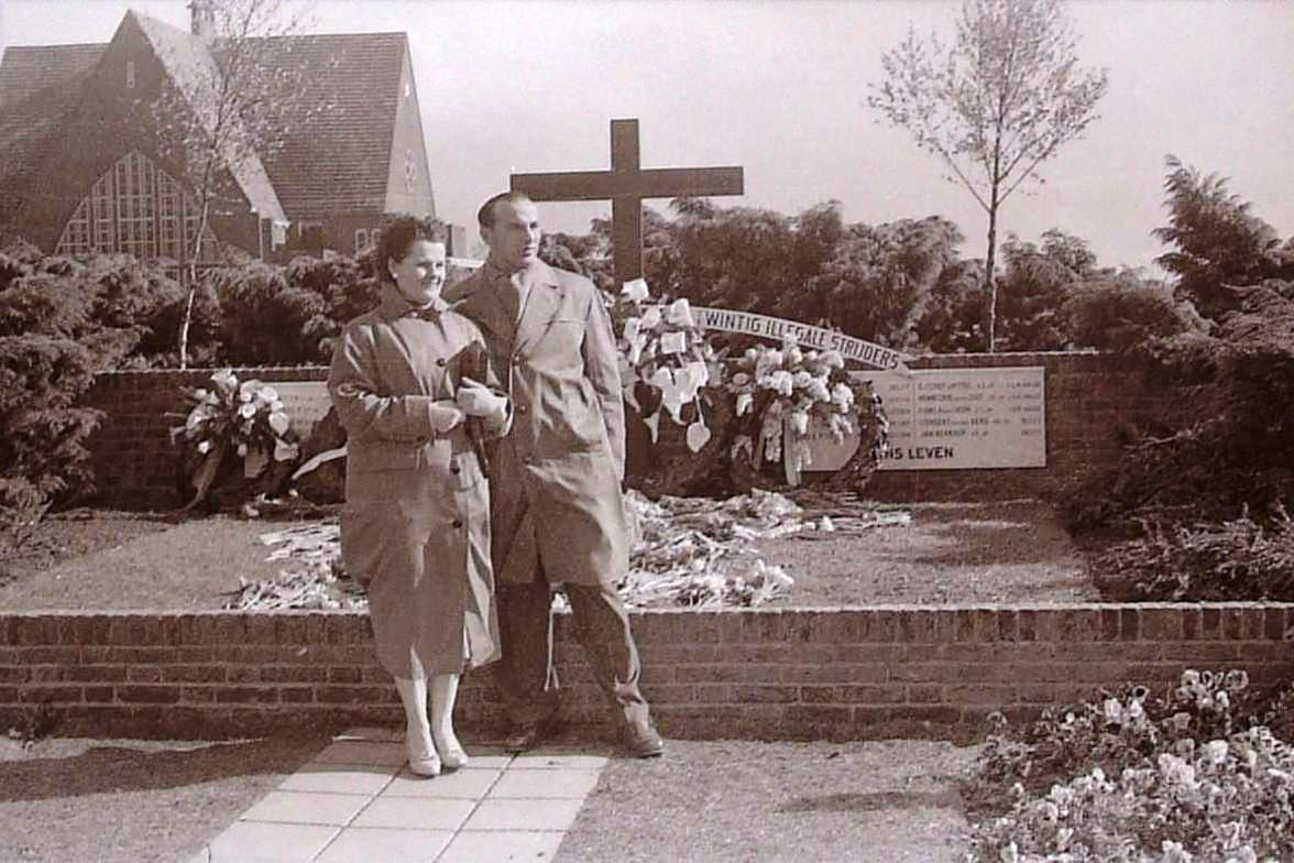 Het monument aan de Goereesestraat op Rotterdam-Charlois, opgericht naar aanleiding van de executie van 20 verzetsstrijders op 12 maart 1945. Op de voorgrond dhr. Halberstadt met z'n vrouw Paultje uit Doetinchem, voormalig trainer van BV De Graafschap, op visite in de Goereesestraat.